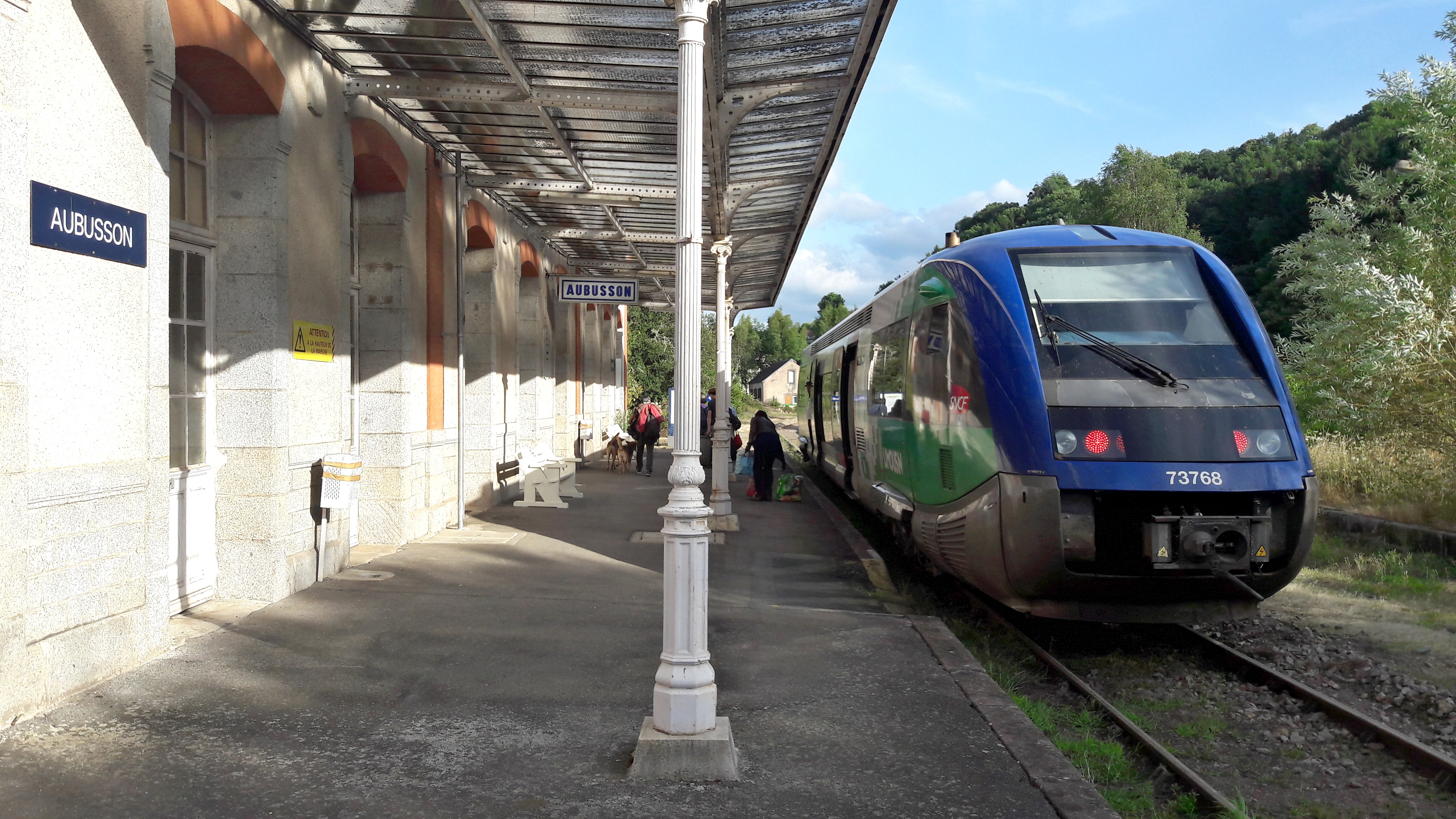 Arrêt du TER n°868 712 un soir d'été